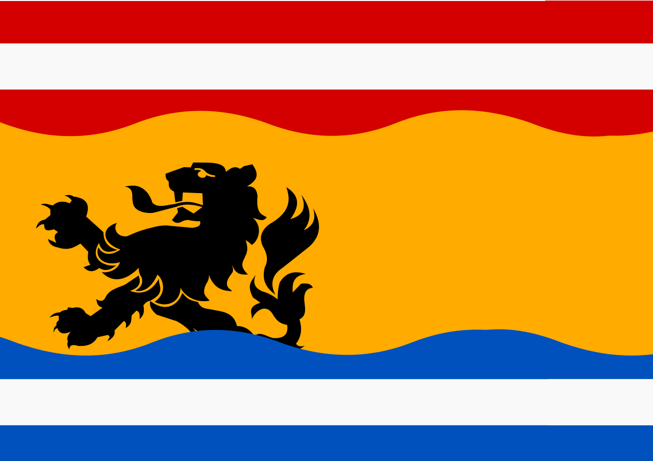 Drapeau de la Frandre Zélandaise